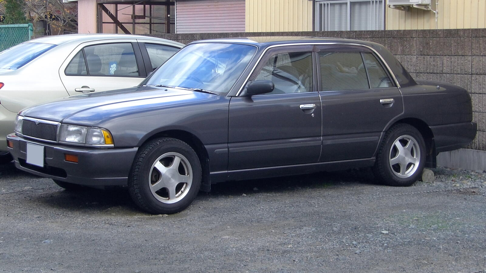 日産・クルーサルーン